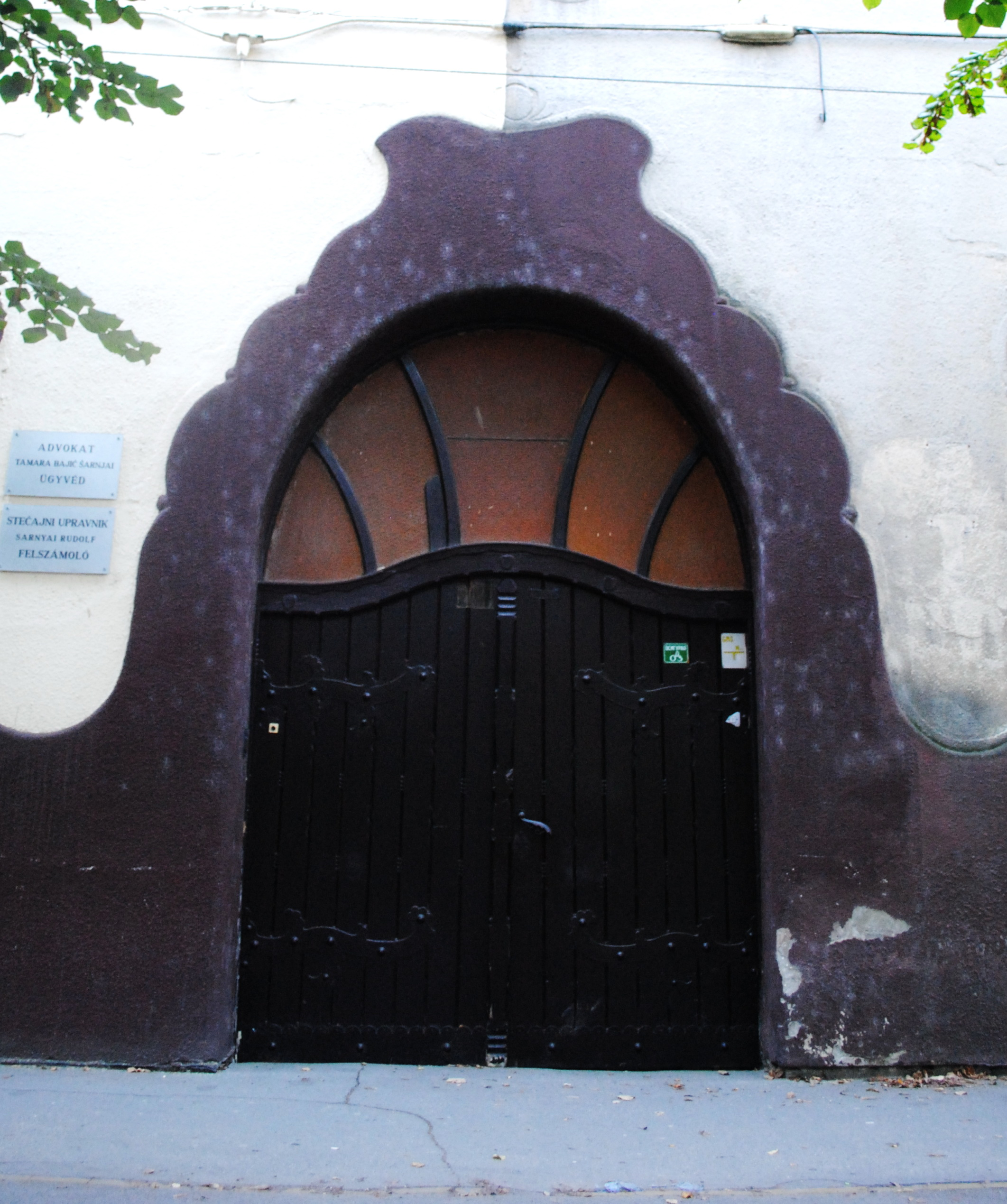 Secesija u Senti, vrata u art nuvo stilu na kuci Slavnica